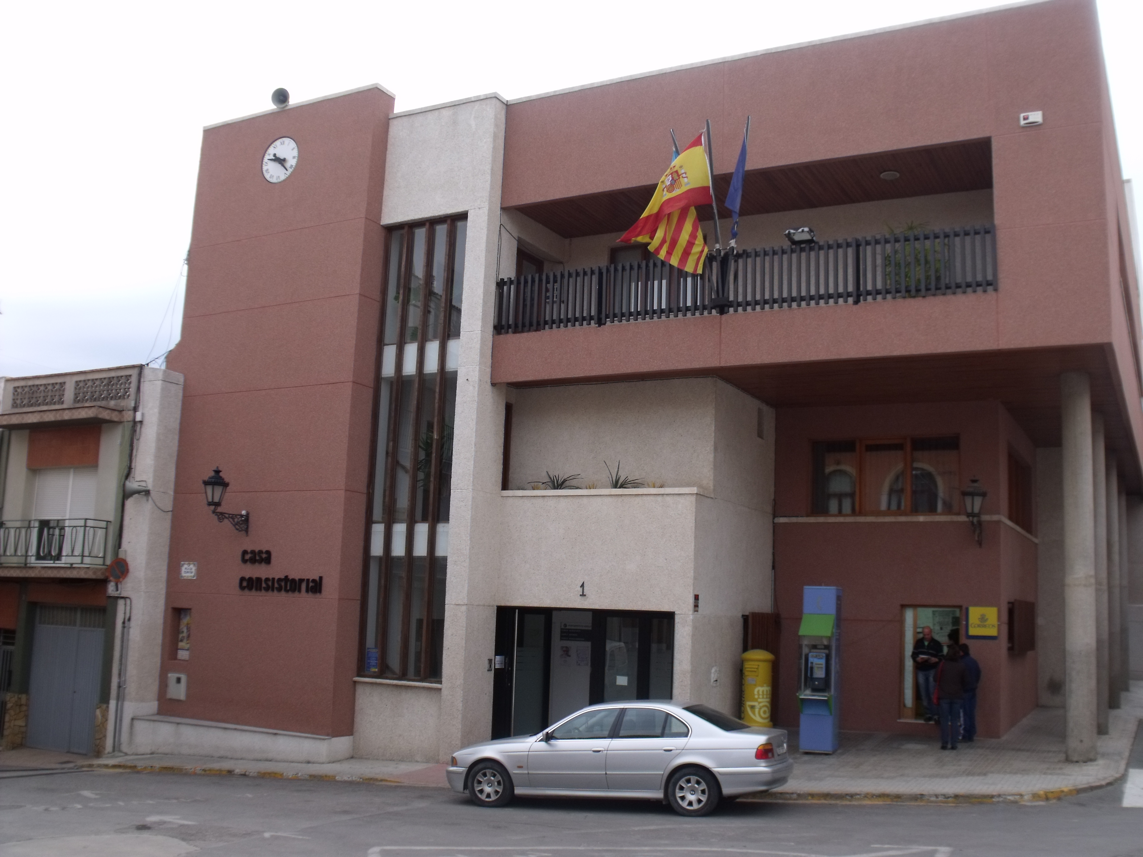 Ayuntamiento de Godelleta.